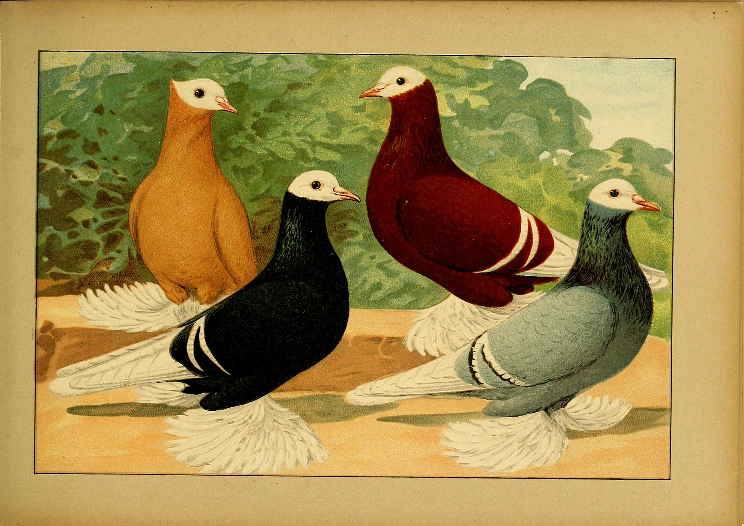 Deutsch